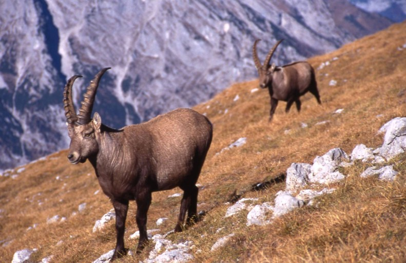 Zwei Steinböcke am Kahlersberg in den Berchtesgadener Alpen